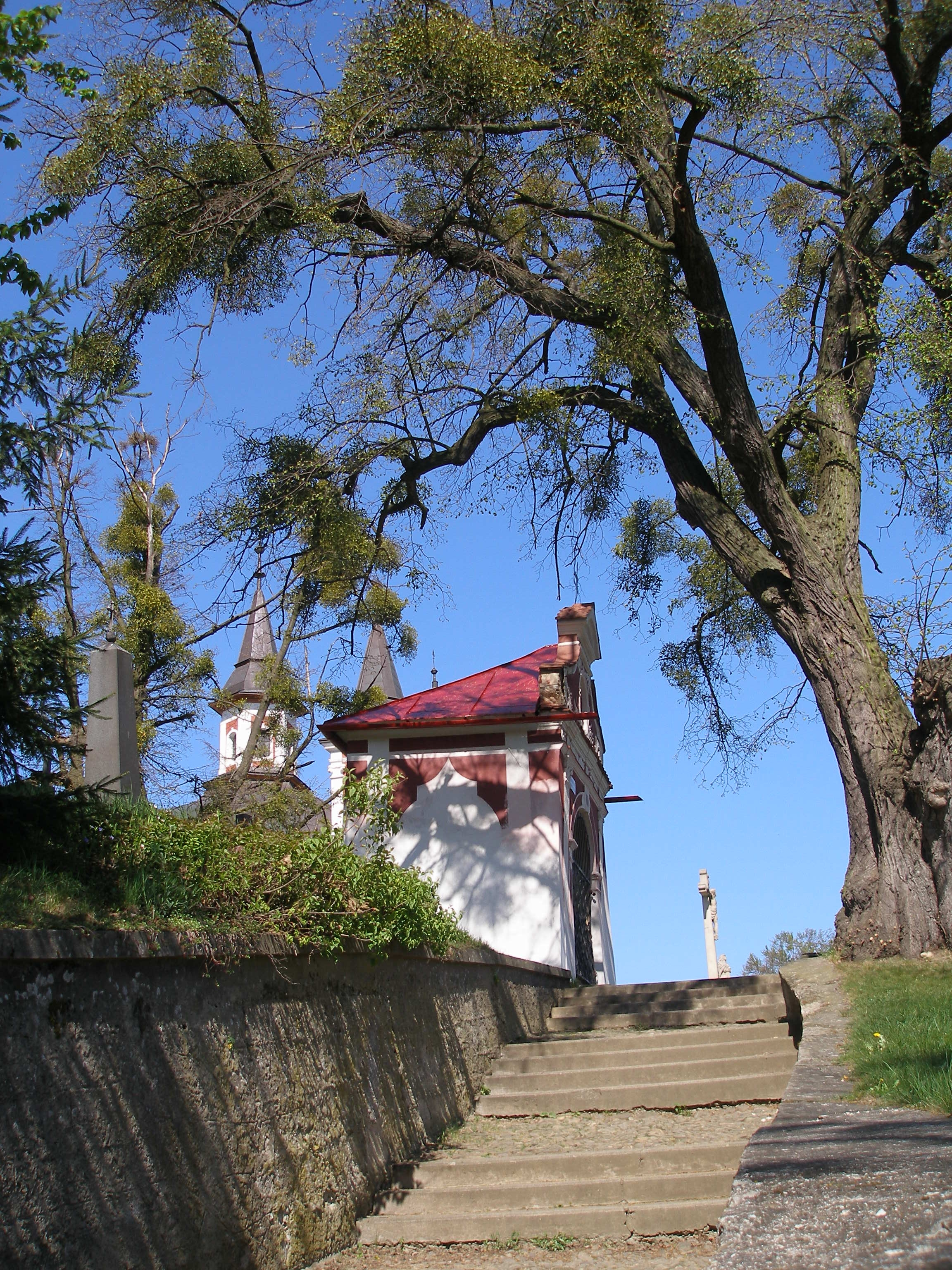 Kaplnka na Kalvárii v Prešove